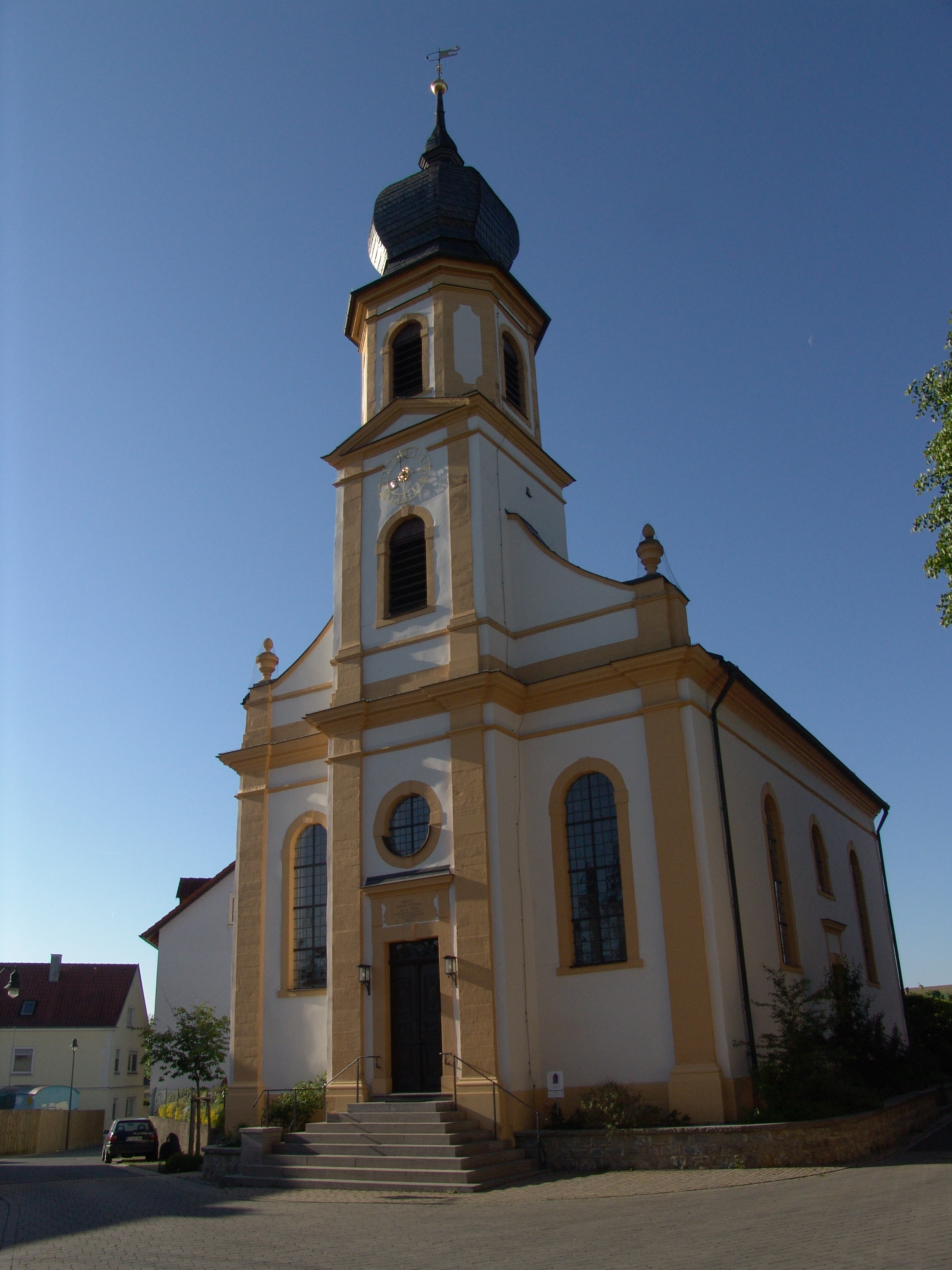 evang.-luth. Kirche St. Andreas in Schernau